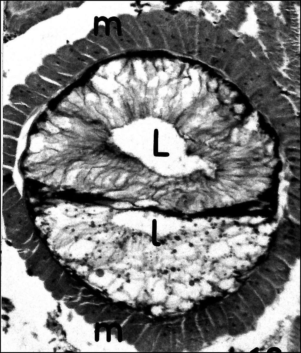 Coupe histologique d'une glande à venin d' Argyroneta aquatica montrant ses deux lobes accolés